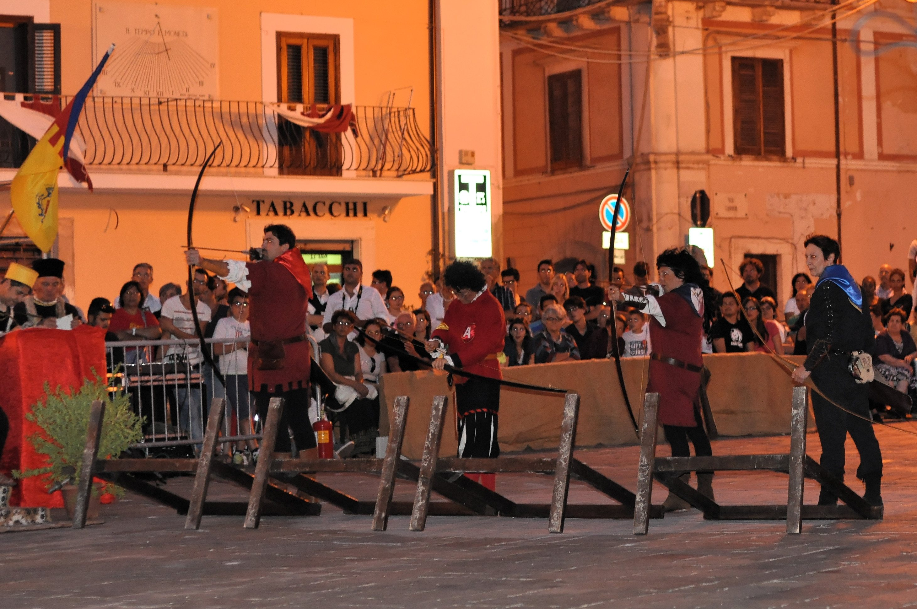 Certame della Balestra di Popoli 2013